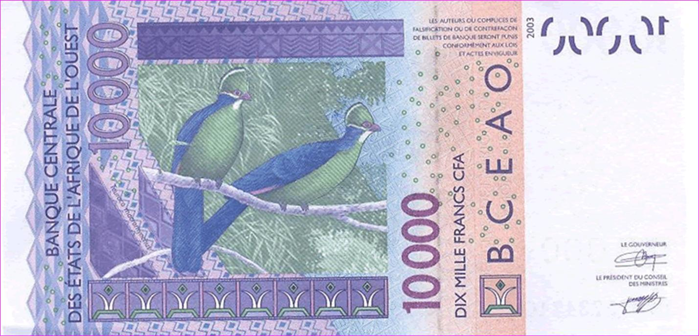 Billet de banque de la Banque centrale de l'Afrique de l'ouest (BCEAO). Valeur : 10000 francs CFA